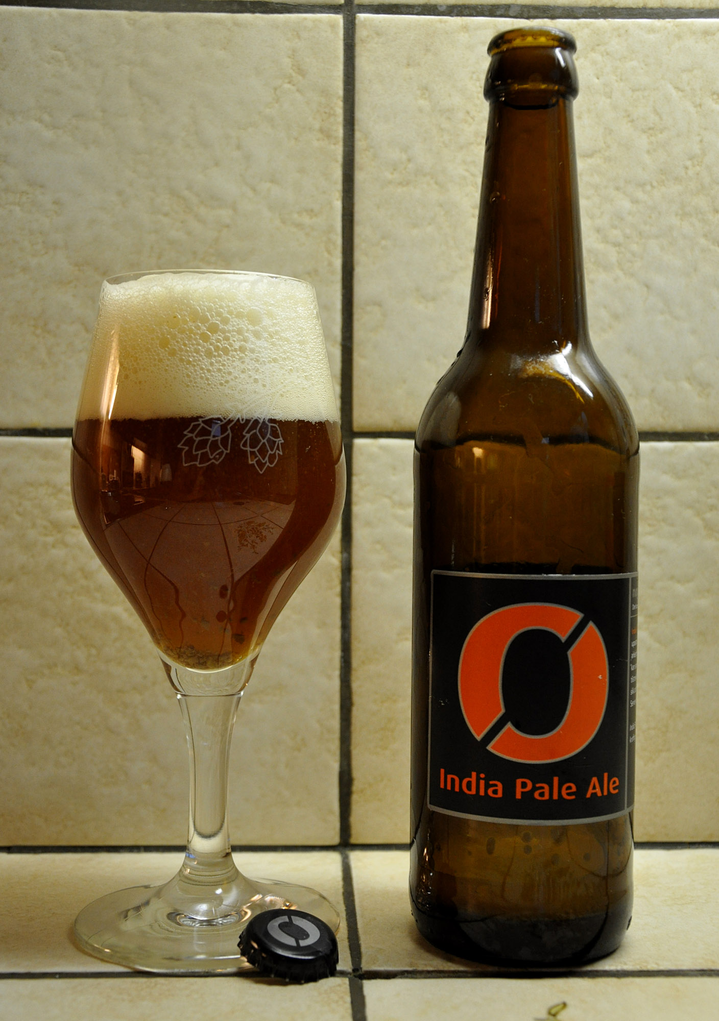 Nogne O IPA